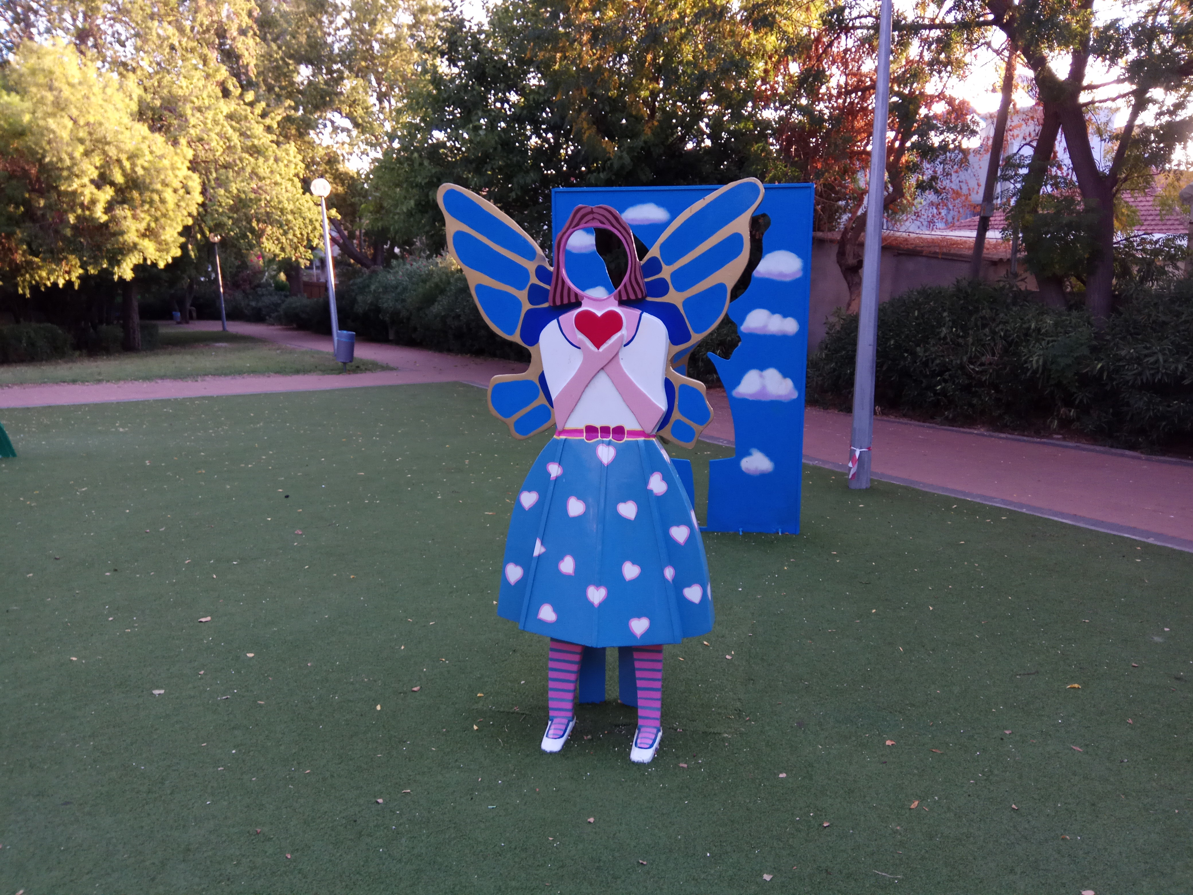 גן סיפור אבא של עמליה נוסע לאוסטרליה